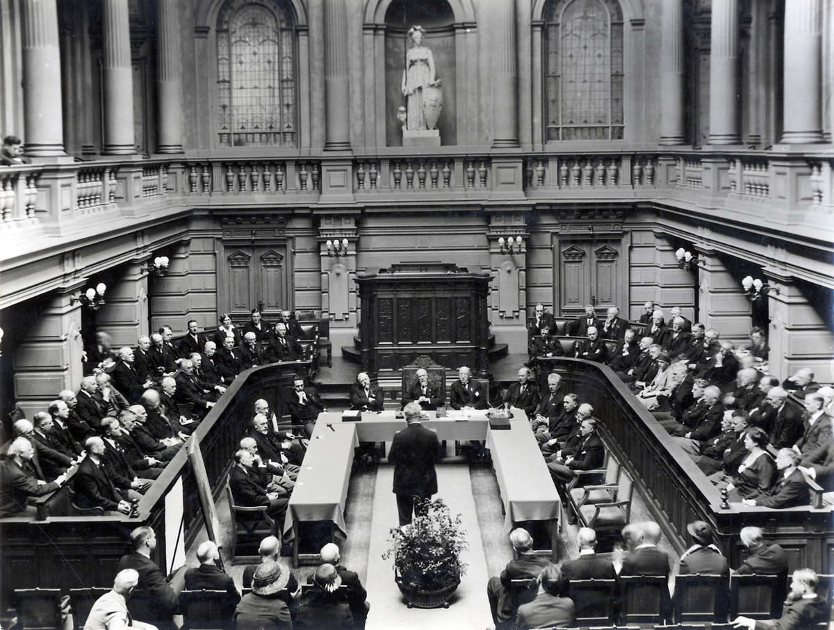 "Het 60e lustrum der Amsterdamse Gemeente Universiteit te Amsterdam, Nederland 1932. Foto: De plechtige opening in de Aula der Gemeente Universiteit."